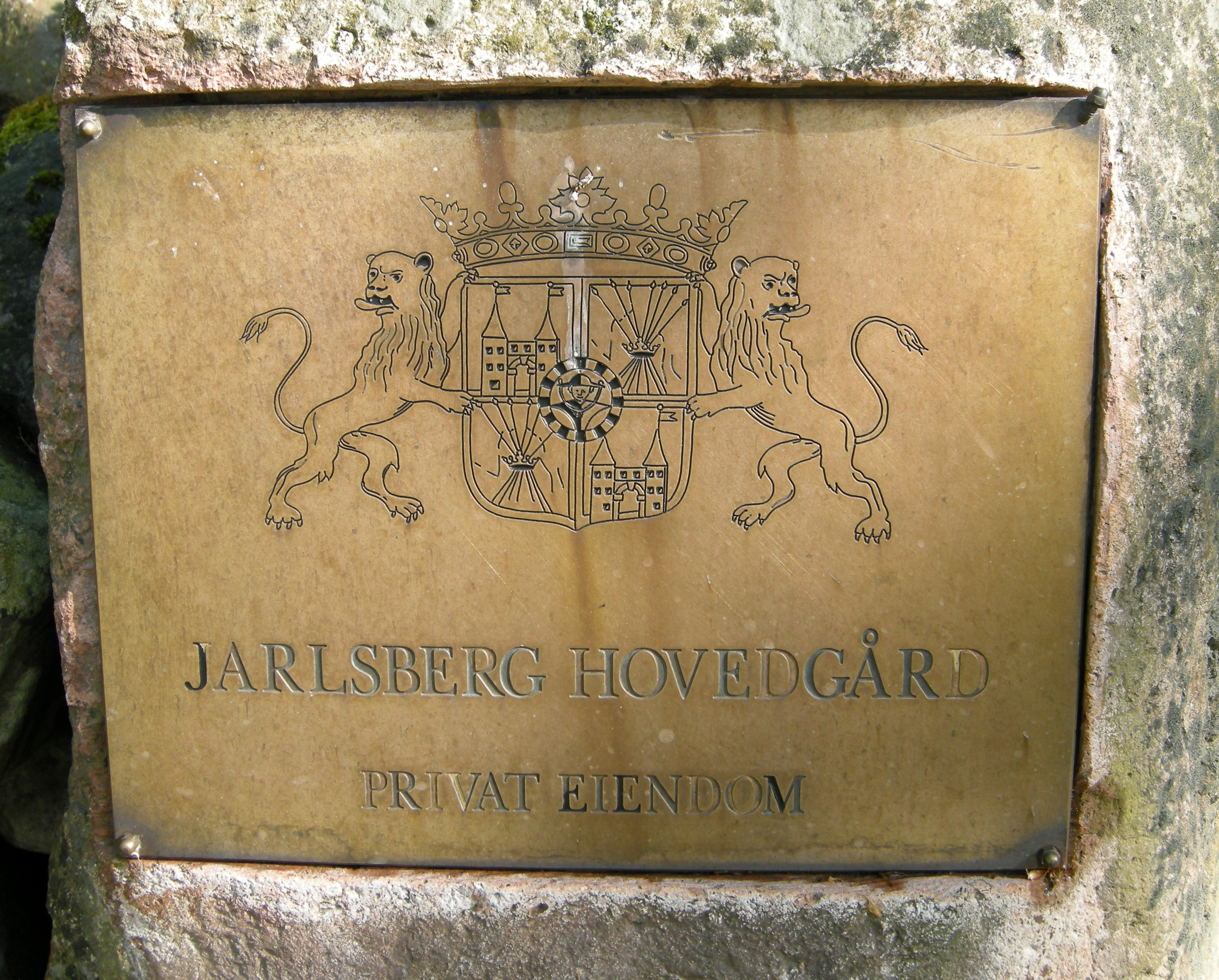 Ved Jarlsberg Hovedgård, våpenskjold